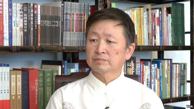 章立凡